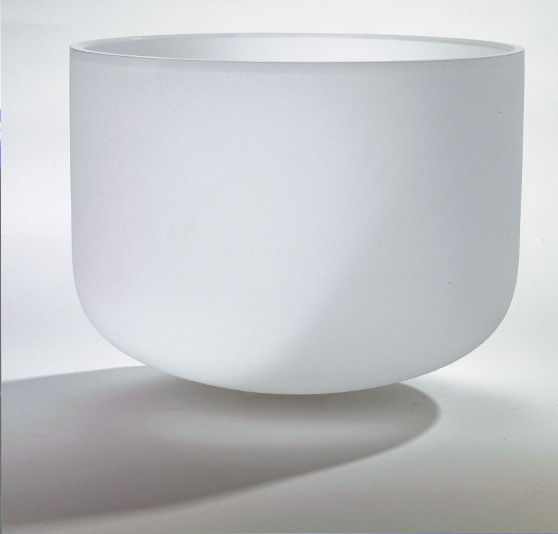 Kristallklangschalen by GilaBenz